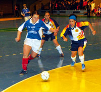 Rússia - Catalunya (Final Campionat d'Europa de Seleccions Absolutes Femenines 2004)